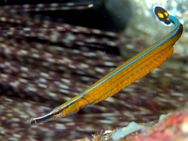 ノコギリヨウジ Doryrhamphus japonicus